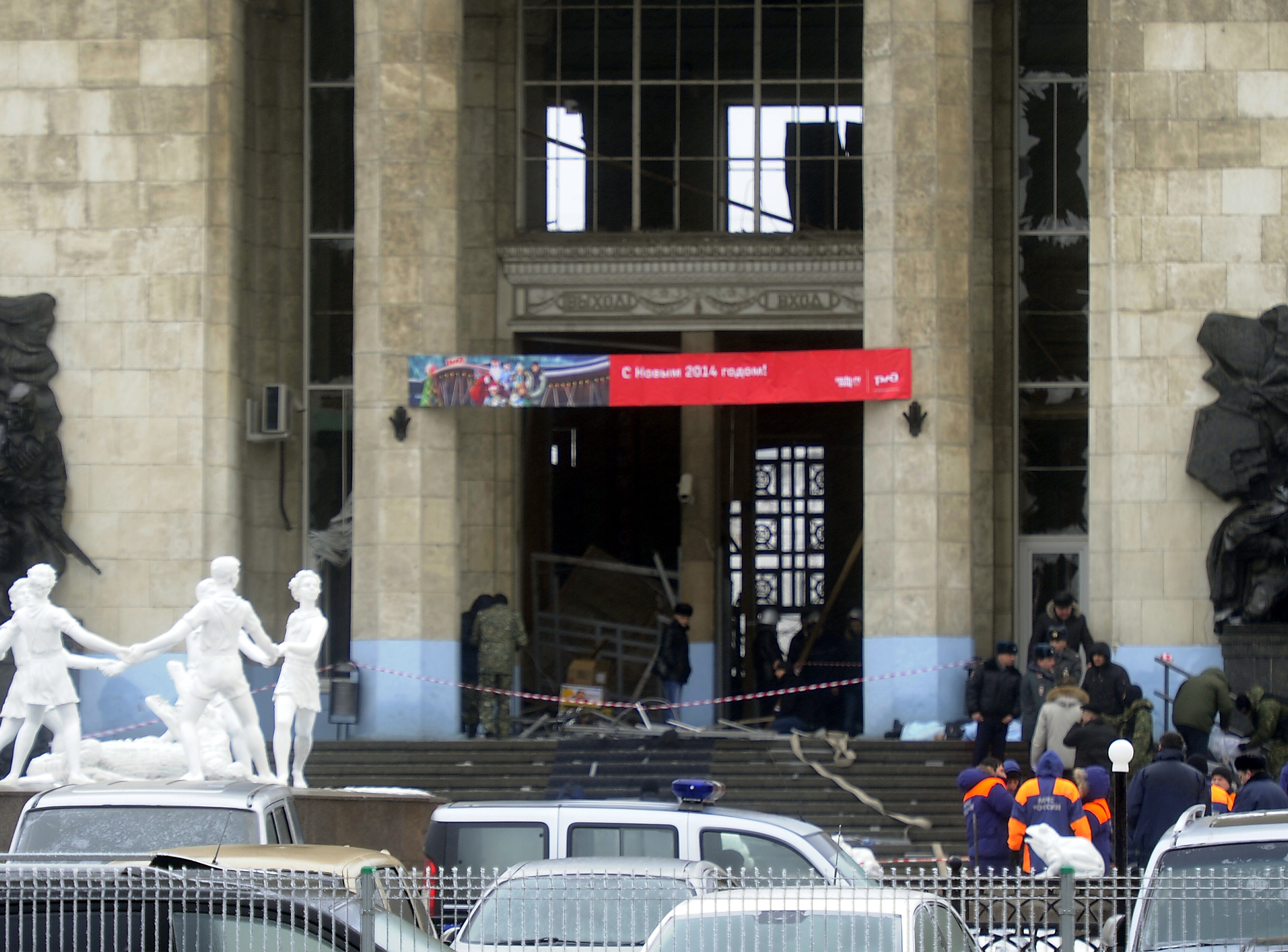 Attentats de décembre 2013 à Volgograd, attentat-suicide dans la gare de Volgograd.